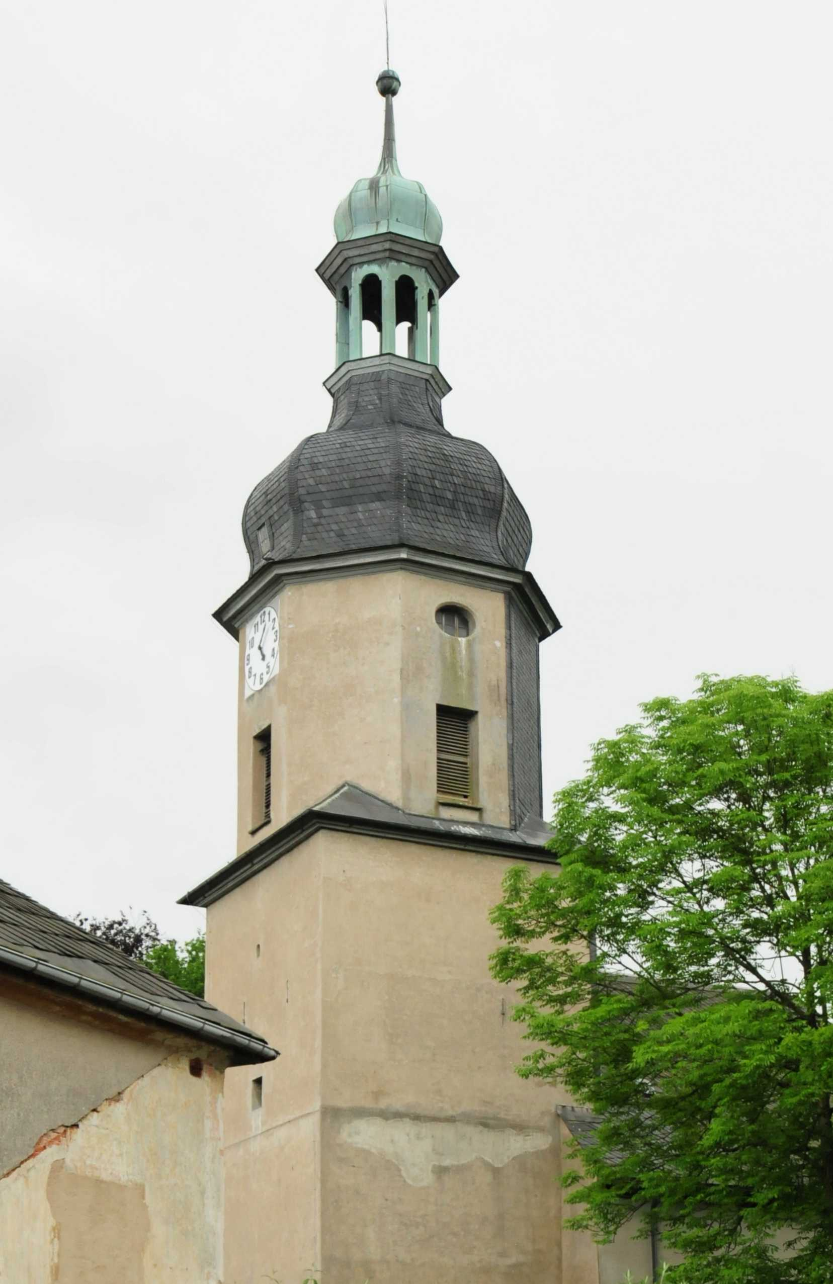 Kirche in Mißlareuth (Deutschland, Sachsen, Vogtlandkreis)Trigonometrischer Punkt 2. Ordnung Nr. 157 der Königlich-Sächsischen Triangulirung in Mißlareuth